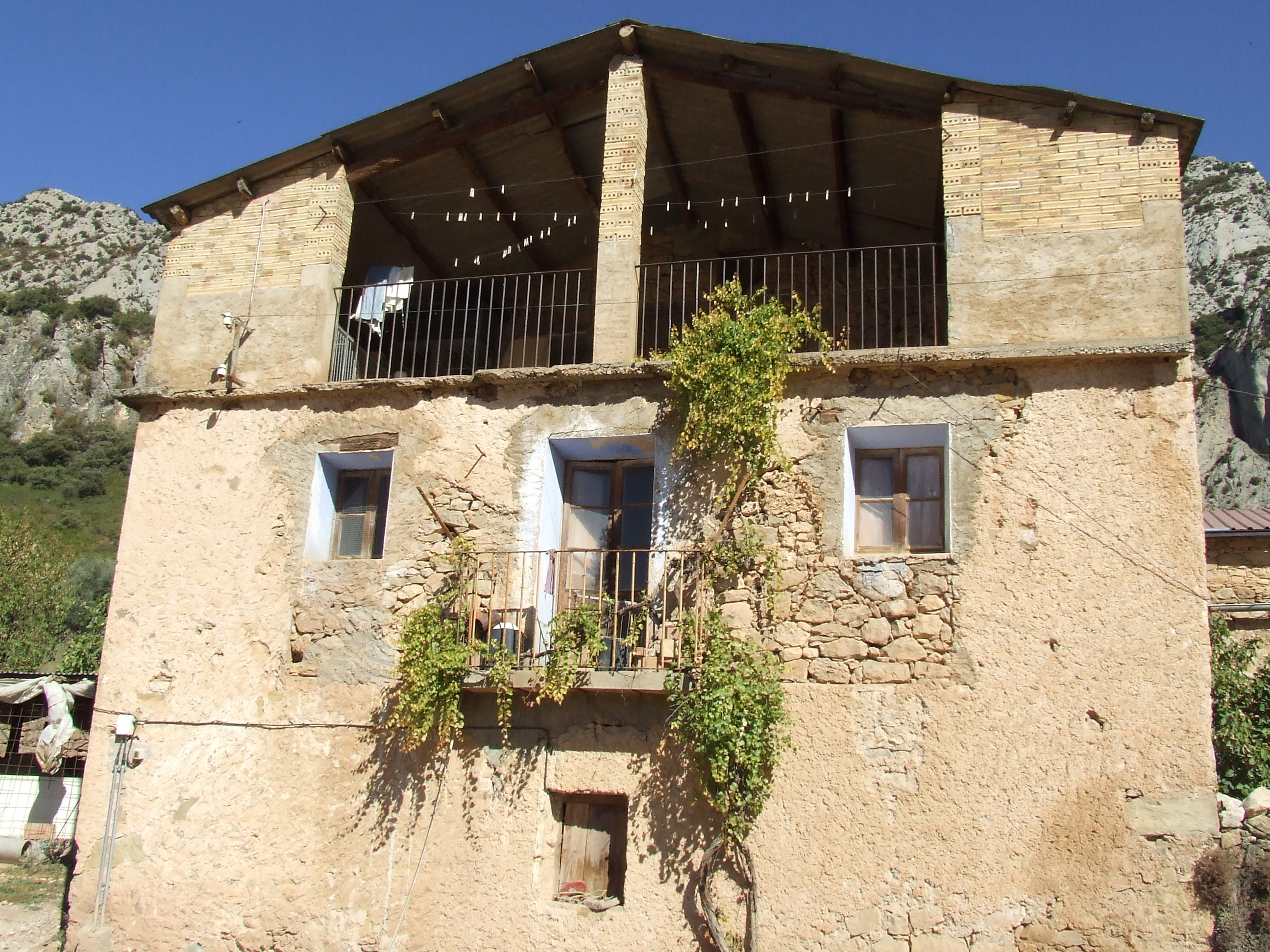 Can Carreu (Abella de la Conca, Pallars Jussà)